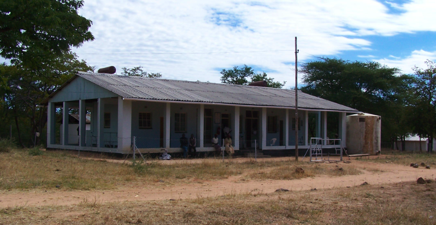 TB ward